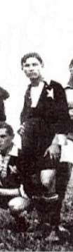 La foto della finalissima contro la Lazio del 5 luglio 1914, vinta dal Casale per 7-1.